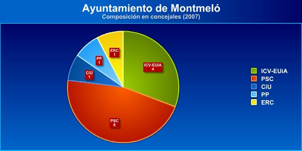 Composición Ayto. de Montmeló